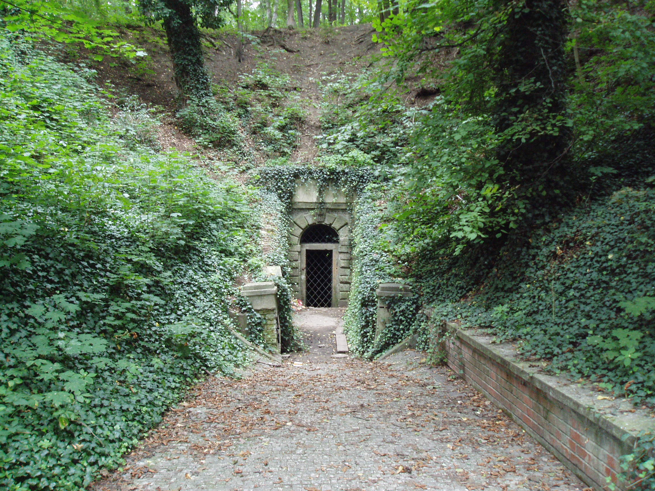 Rudolfova štola